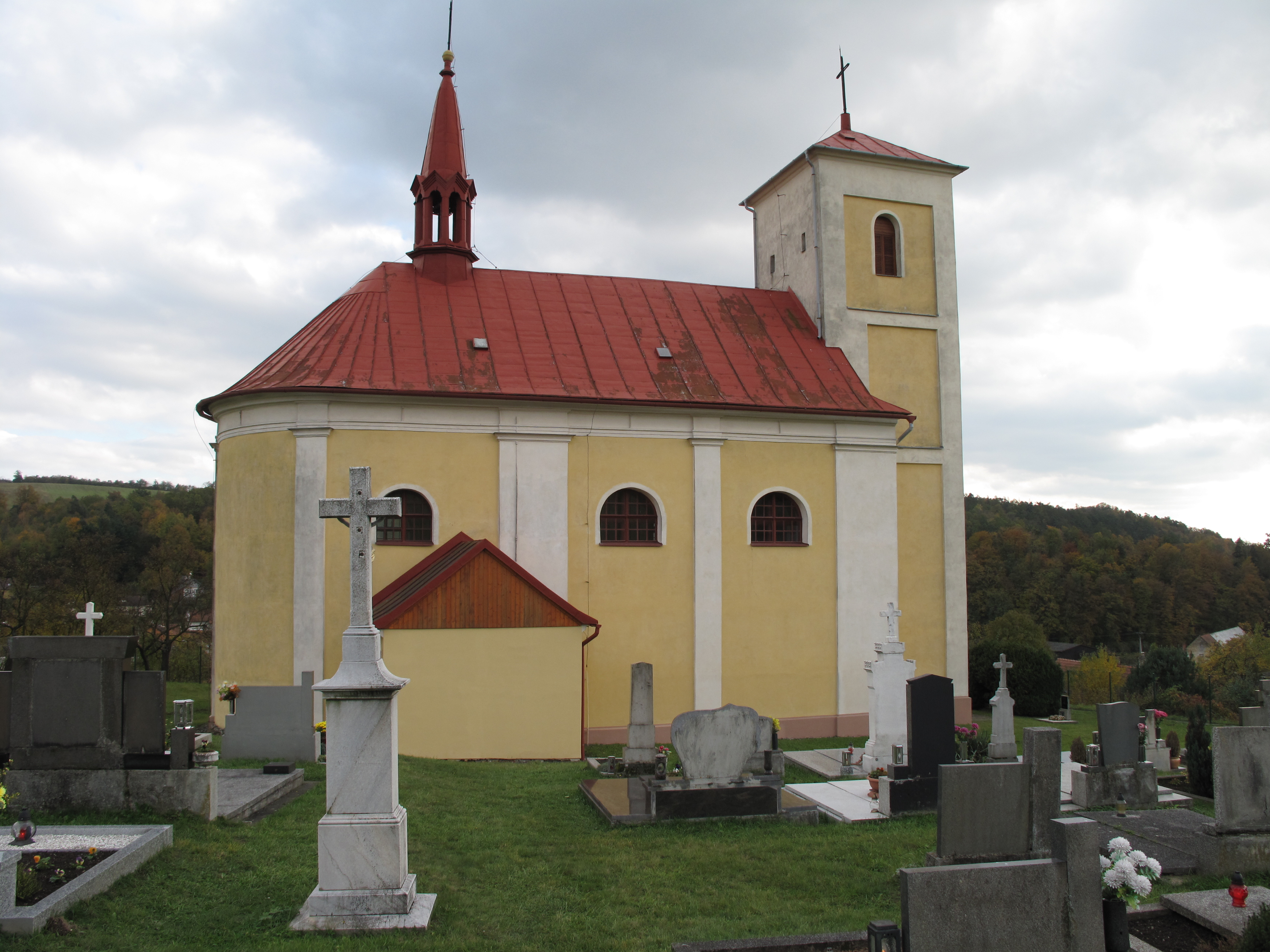 Lukavec (Fulnek). Okres Nový Jičín, Česká republika.